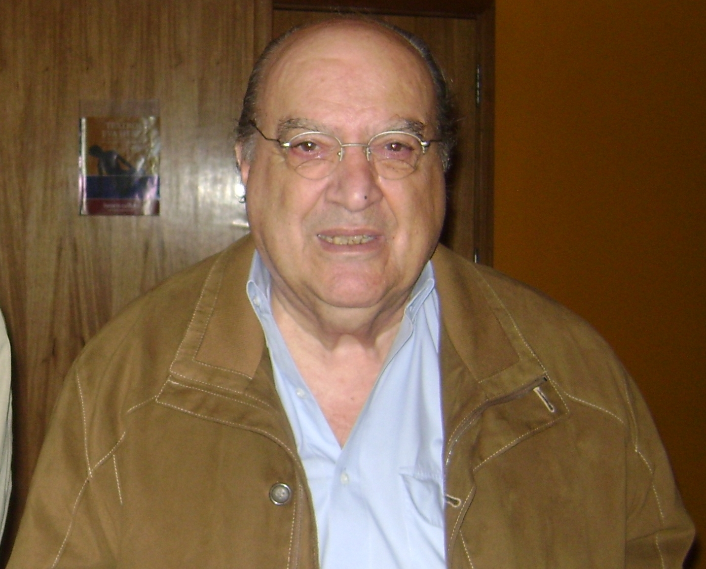 Antônio Abujamra, ator brasileiro, após a apresentação da peça "Uma Informação Sobre a Banalidade do Amor", em São Paulo.